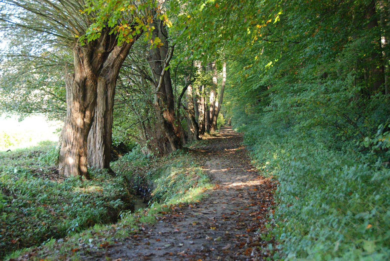 Limburgs: Sjtraobaek aan de rand van de Ravesbösj bie 't gehuch Sjtraobaek